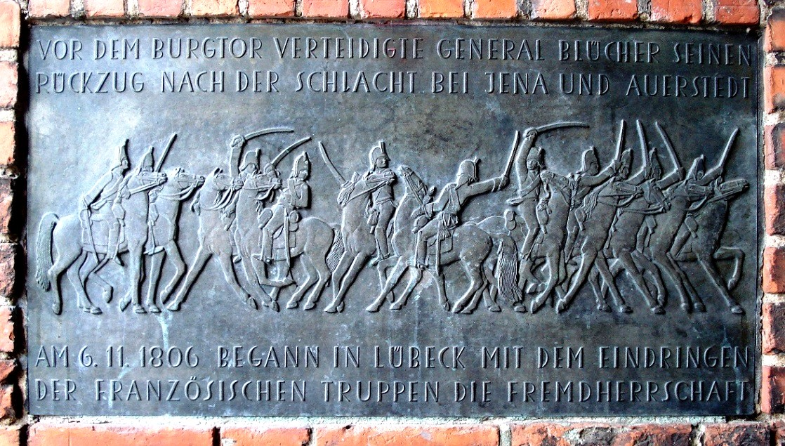 Luebeck_-_Gedenktafel_06.11.1806